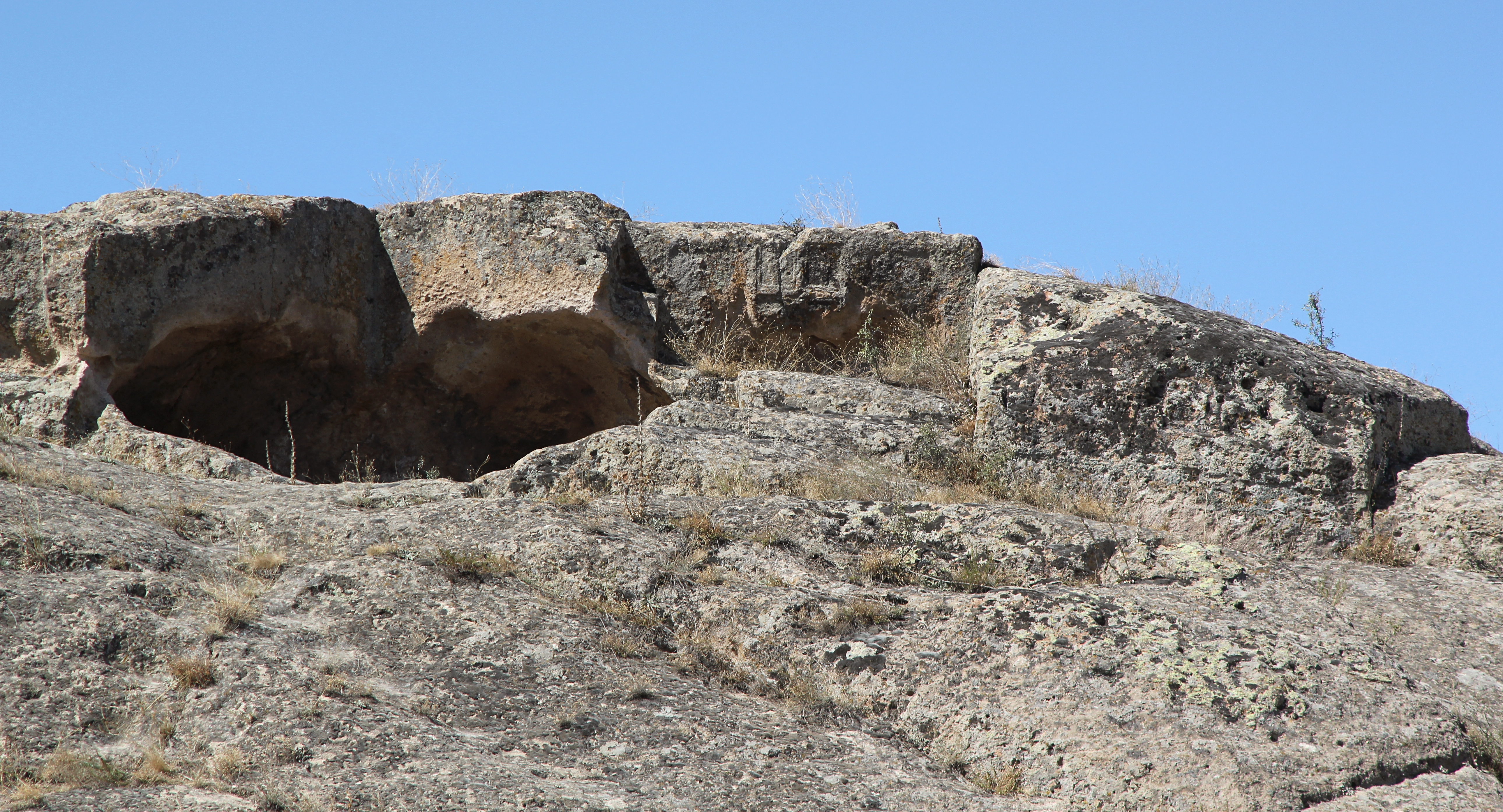 Yumruktepe, Hügel bei Beyköy im Bezirk İhsaniye der türkischen Provinz Afyonkarahisar, Gipfel mit hethitischer Flügelsonne